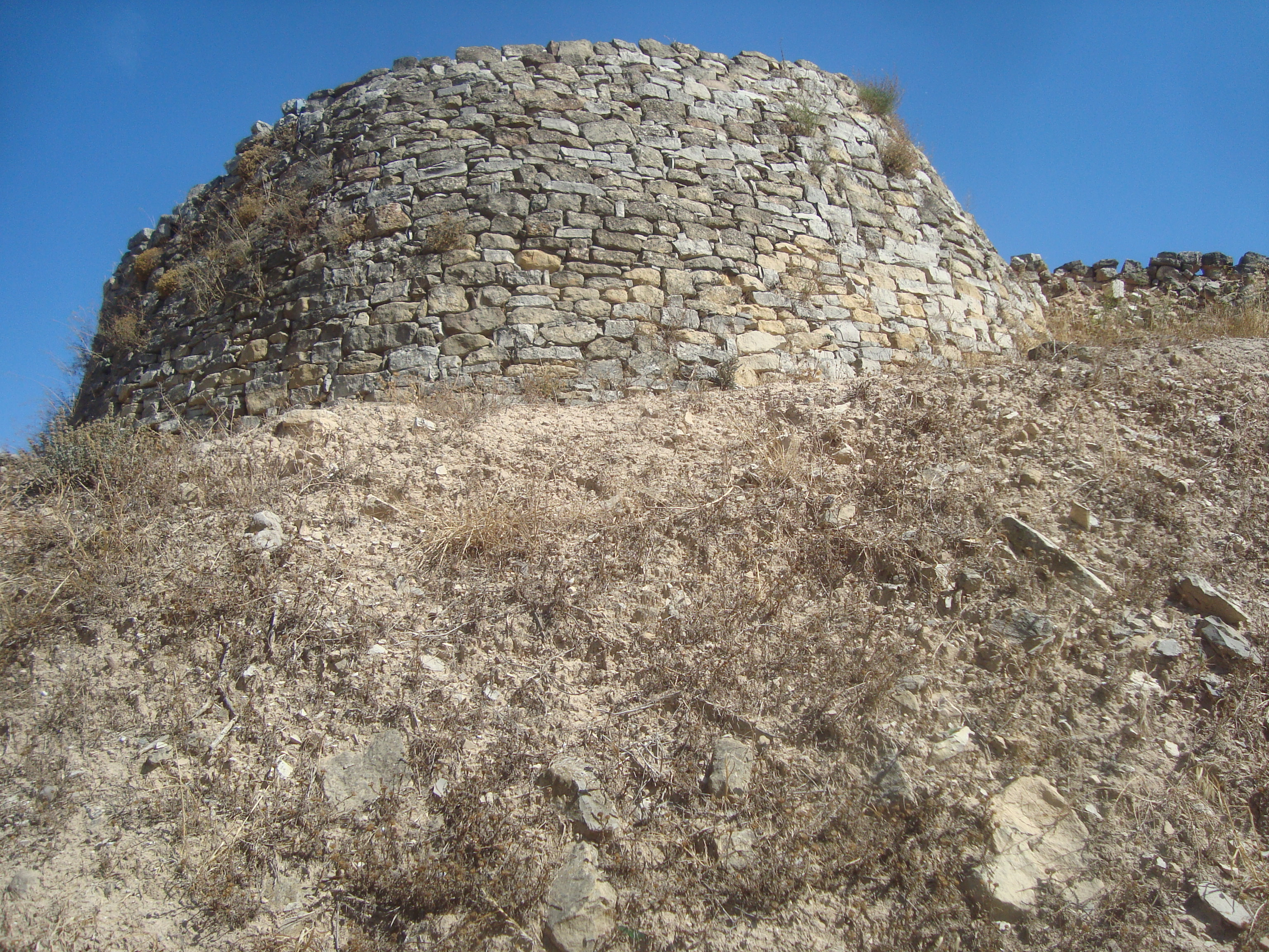 Poblat del Coll del Moro (Gandesa)